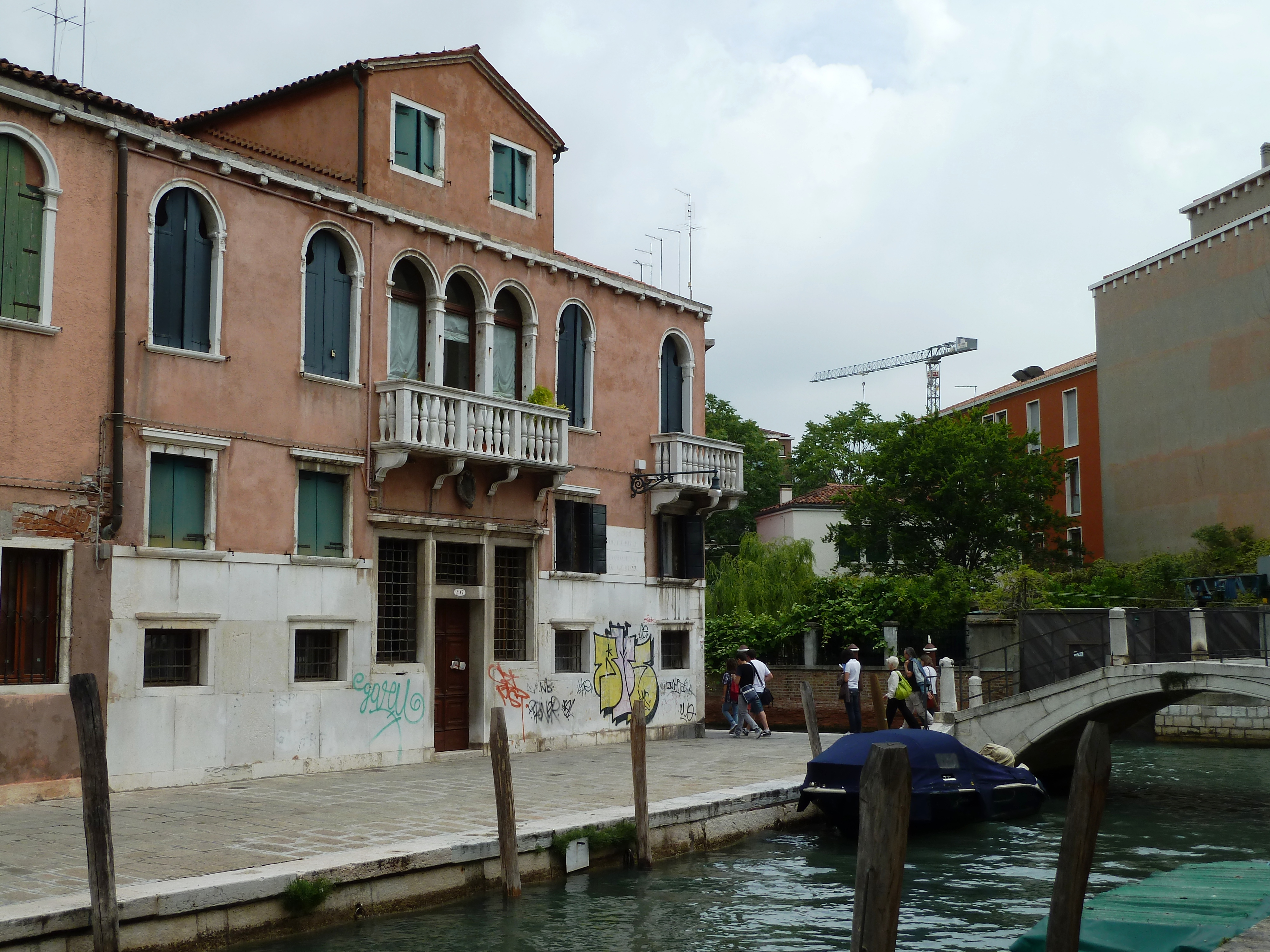 palais dolce